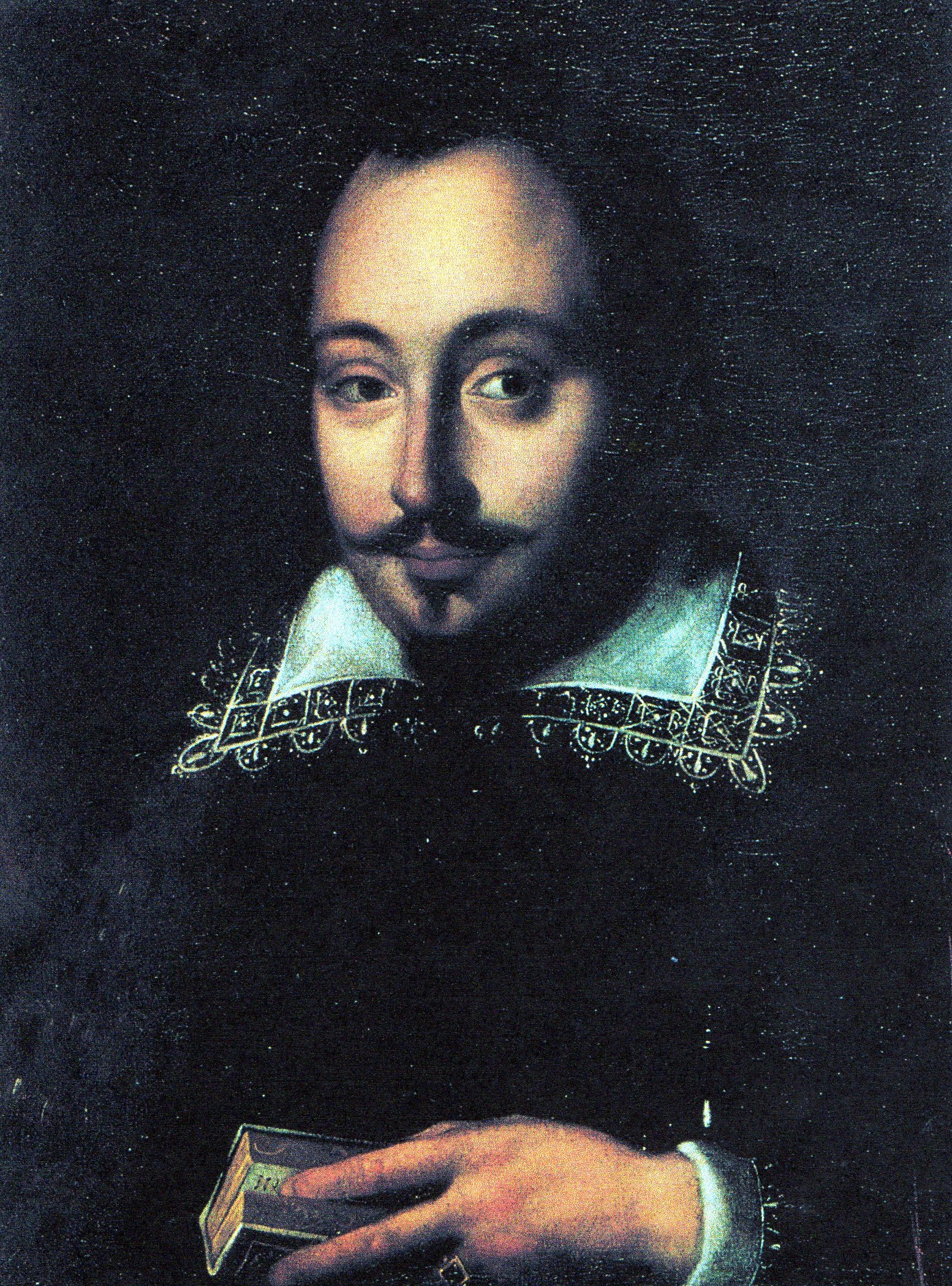 ritratto dello scienziato Federico Cesi